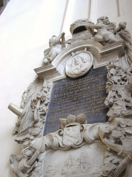 Epitaaf bij het graf van Willem van der Zaan, gemaakt door Rombout Verhulst. Oude Kerk (Amsterdam).